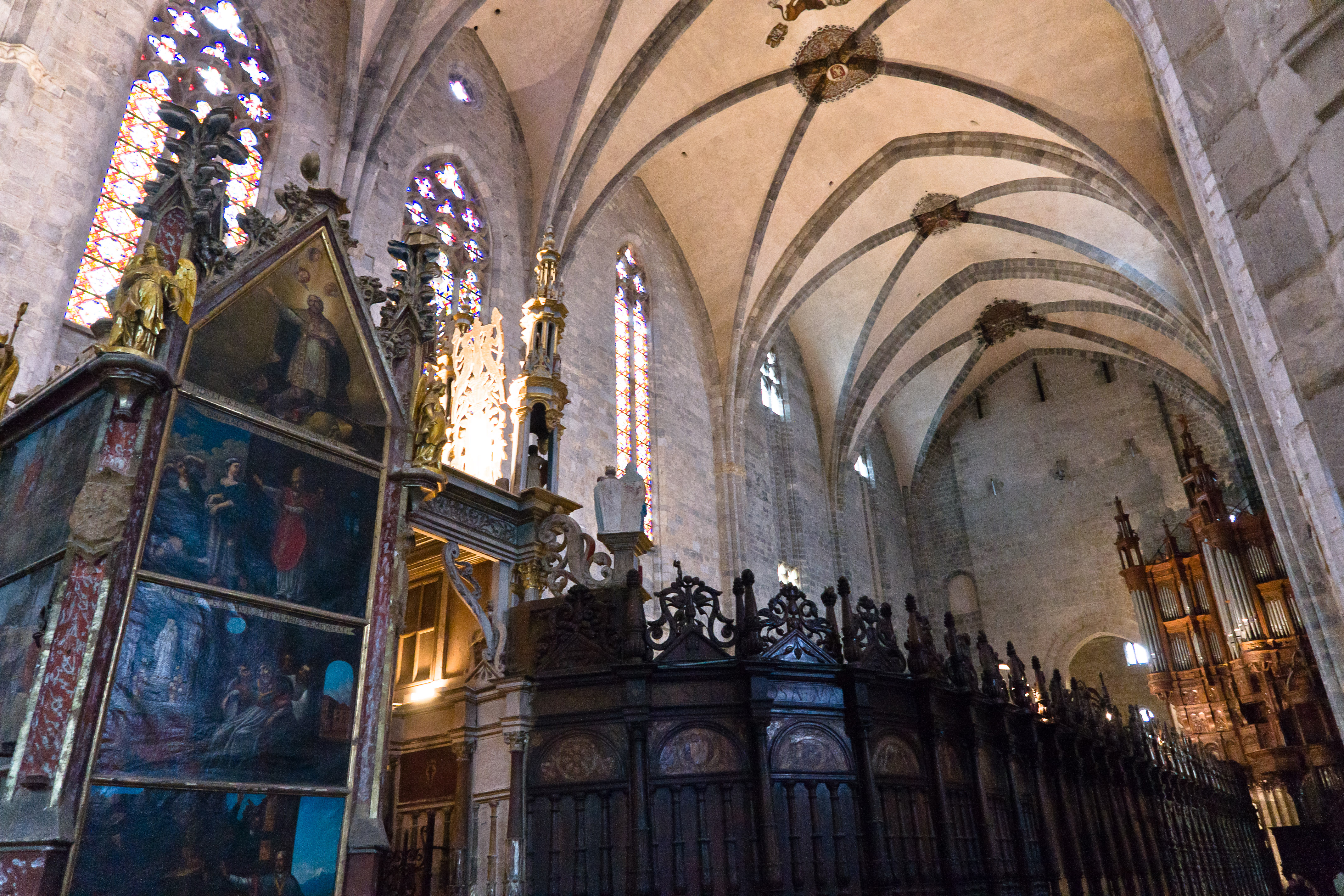 Vue de l'intérieur de la cathédrale de St Bertrand de Comminges